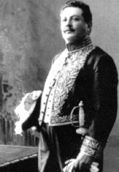 Bautista Saavedra Mallea, presidente de Bolivia de 1920 a 1925.